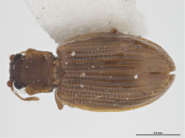 Latridius minutus